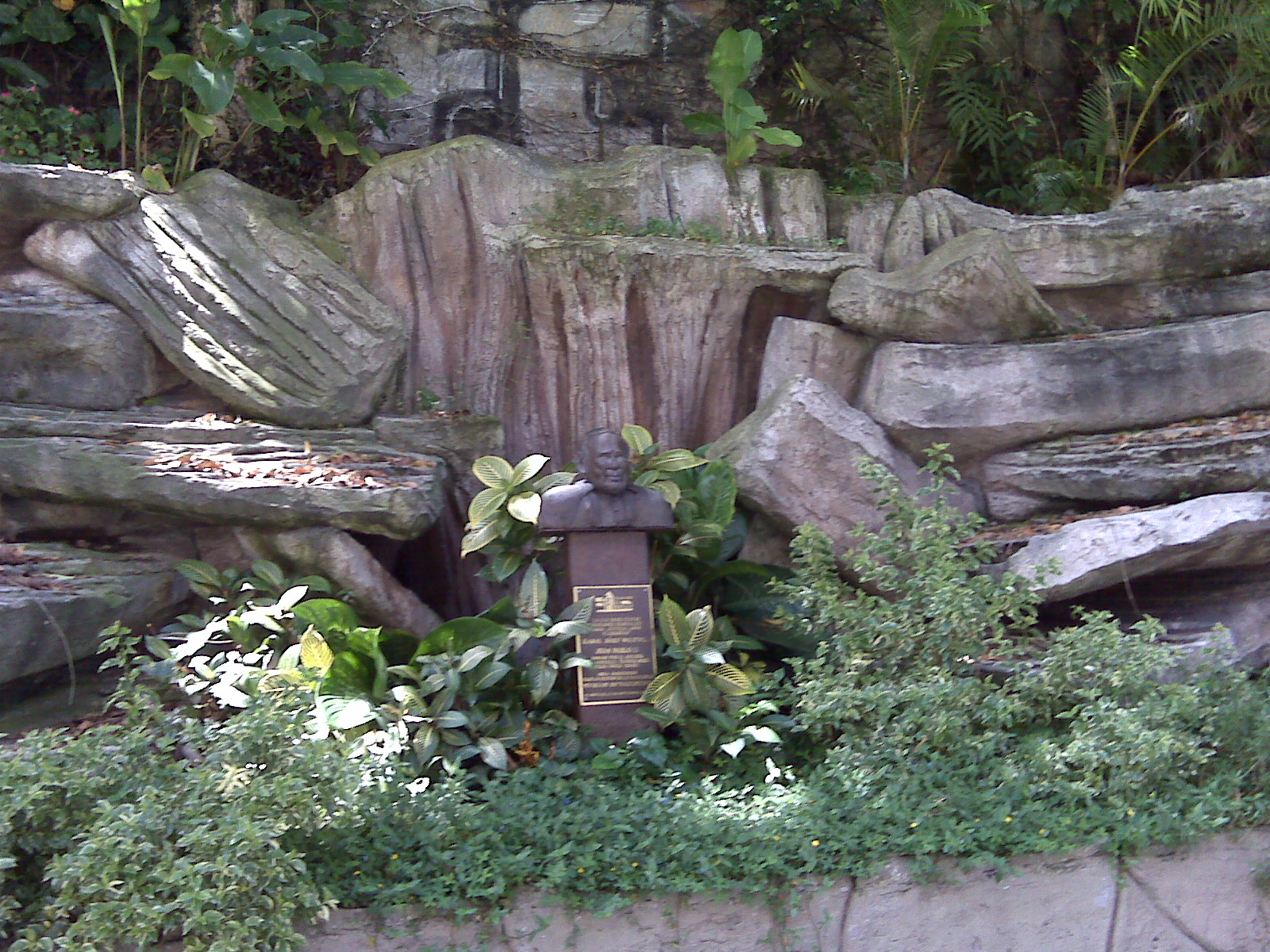 Gruta de Juan Pablo II en el Municipio El Hatillo, localizada en la intercomunal Baruta - El Hatillo entre las urbanizaciones La Boyera y Los Pinos, estado Miranda - Venezuela (2012)